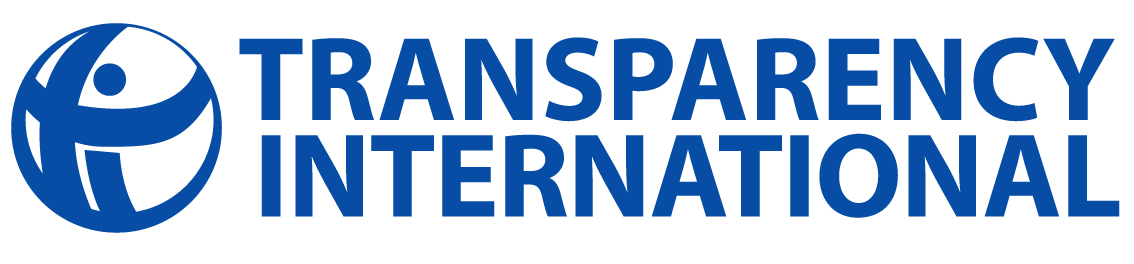 Логотип международной организации Transparency International